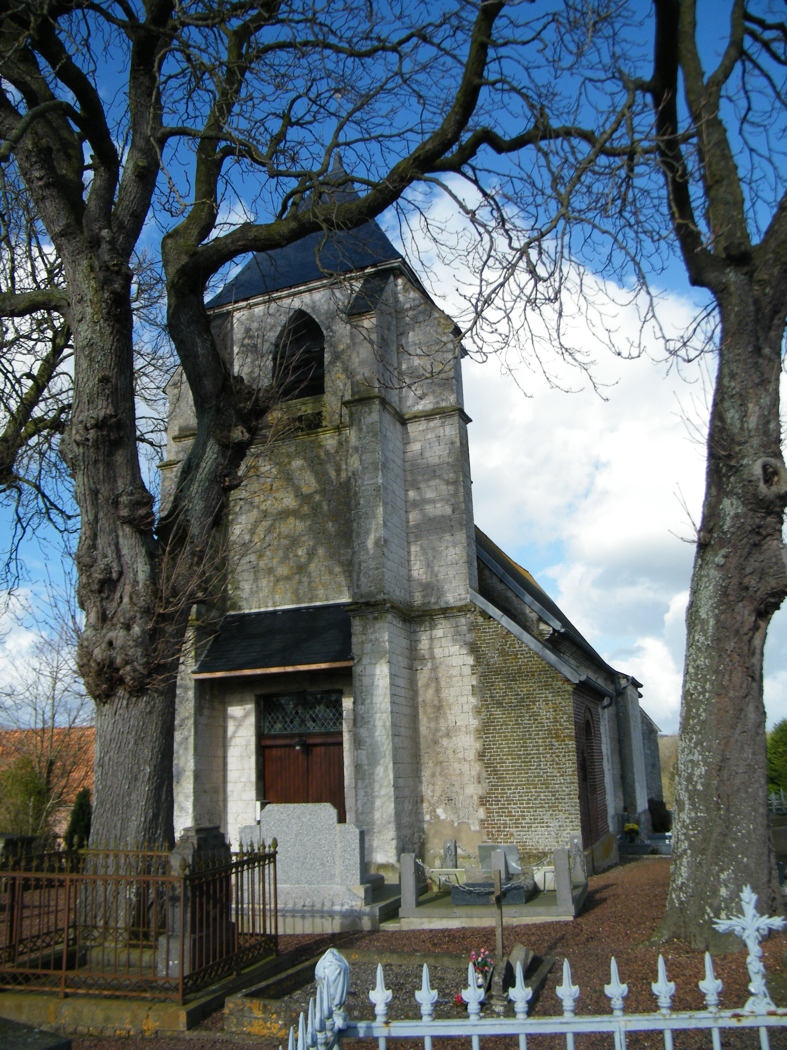 Le clocher de l'église de Boufflers (Somme), France.